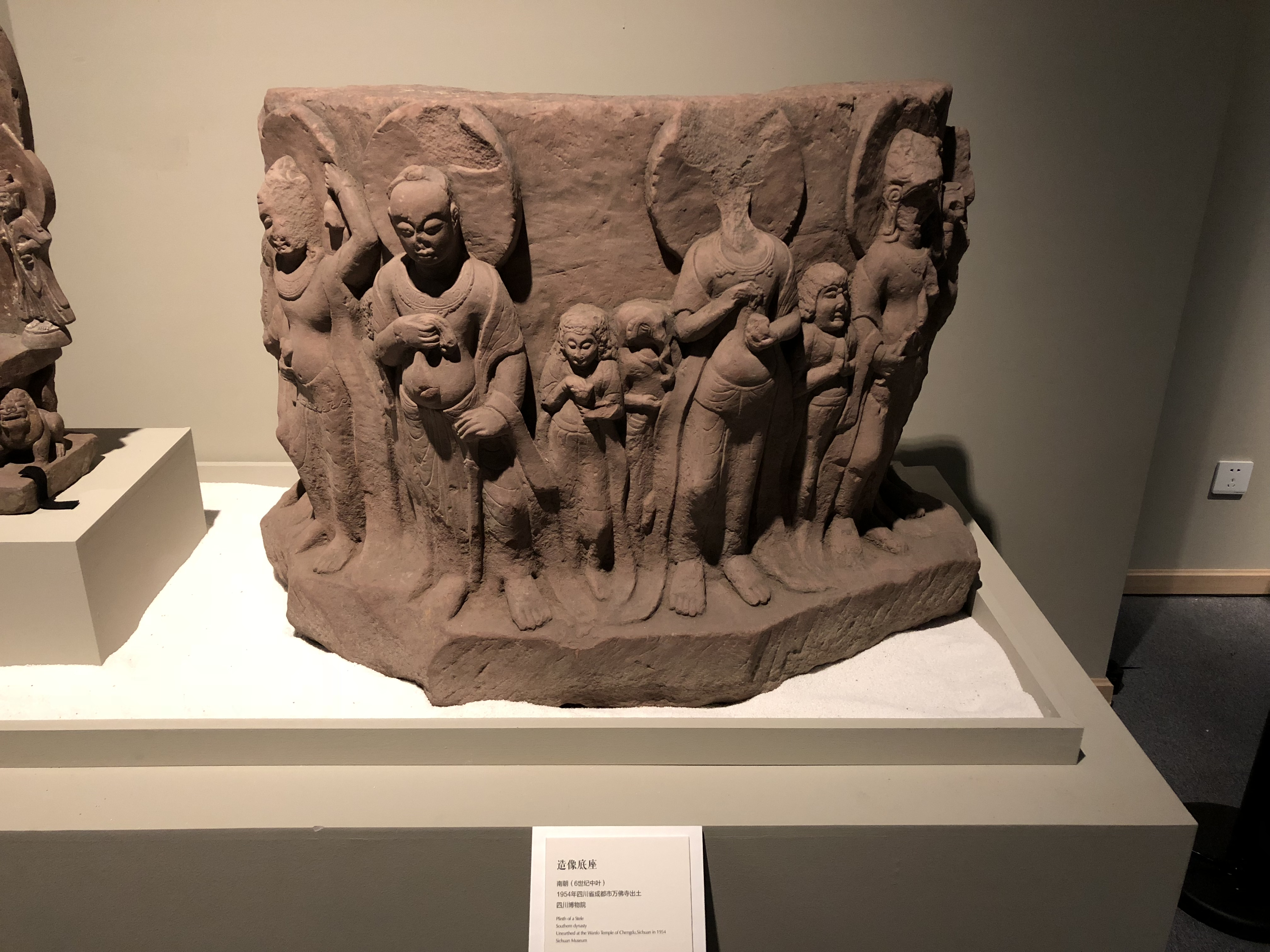 中文（台灣）: 四川省博物院館藏文物